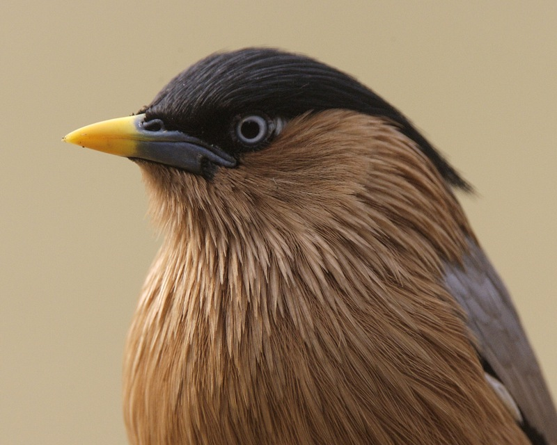 Brahminy Starling Sturnus pagodarum Keoladeo National Park, Rajastan, India 7th. January 2009